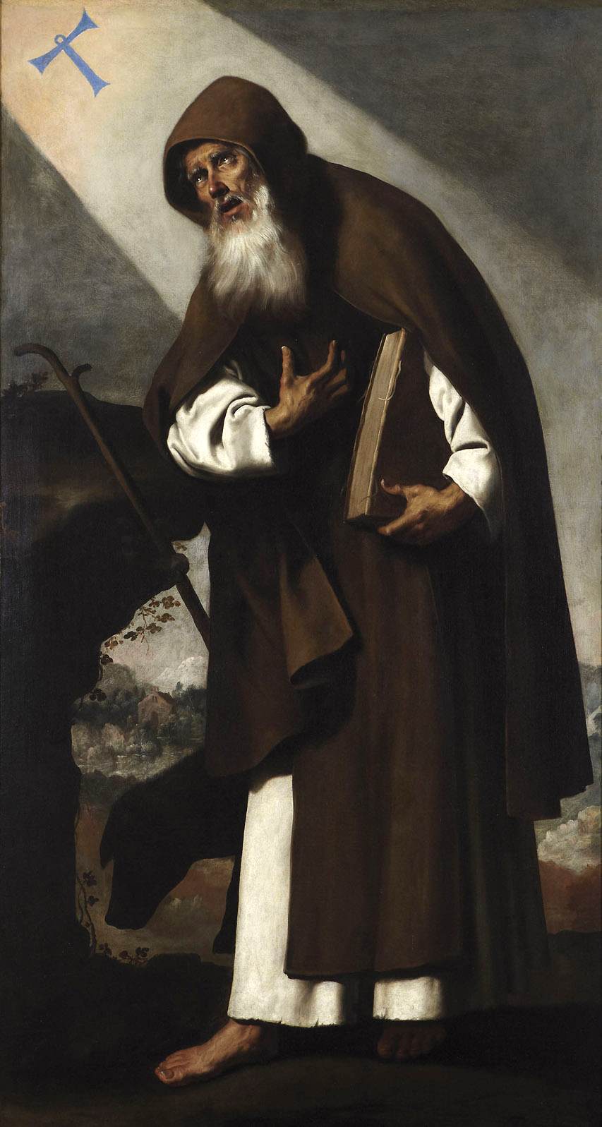 San Antonio Abad, por Francisco de Zurbarán.